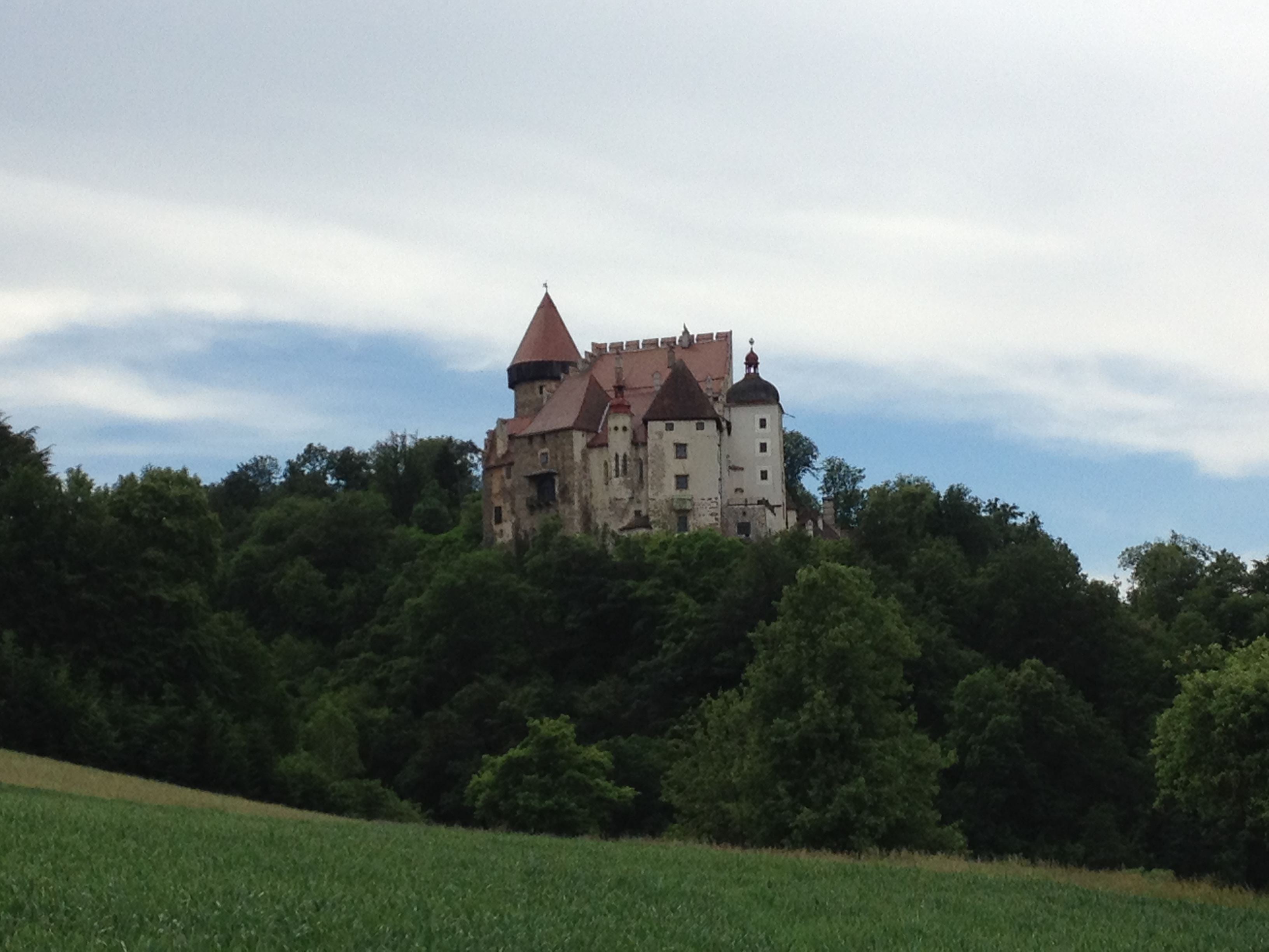 Klamburg von Achatzberg aus gesehen